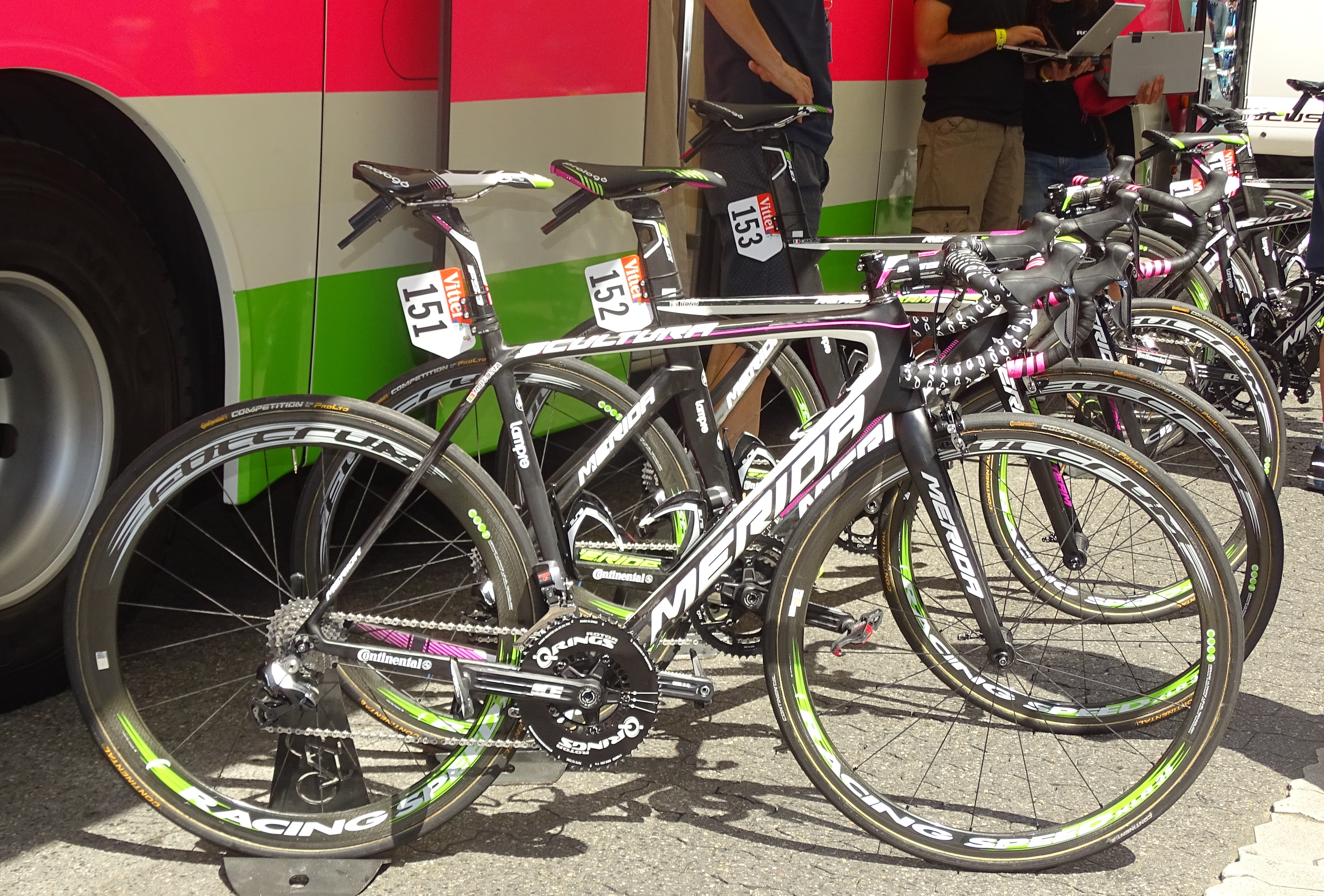 Reportage réalisé le lundi 6 juillet à l'occasion du départ de la troisième étape du Tour de France 2015 à Anvers, Belgique.